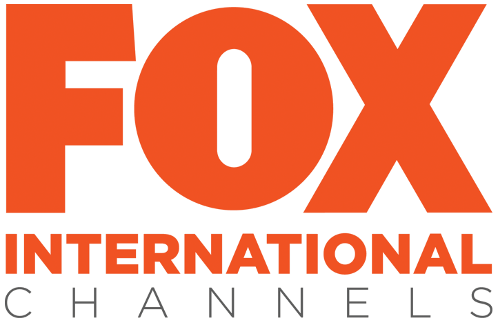 This is the logo of Fox International Channels.